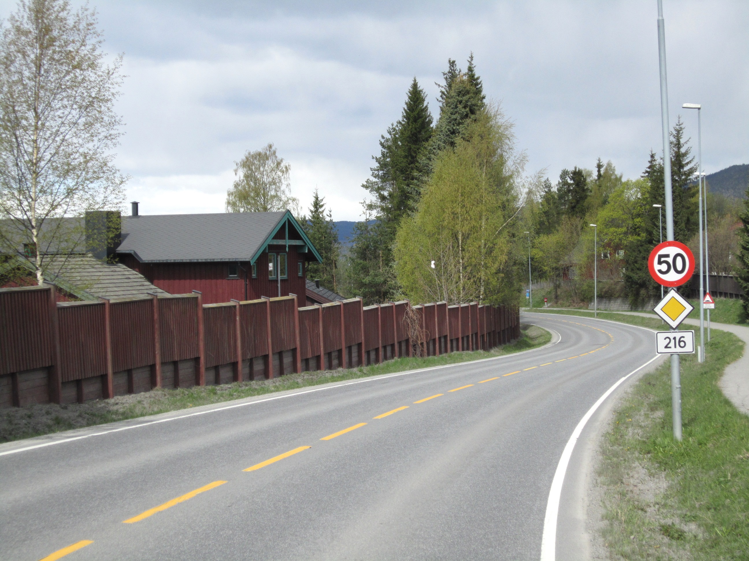 Messenlivegen (fylkesvei 216) på Lillehammer